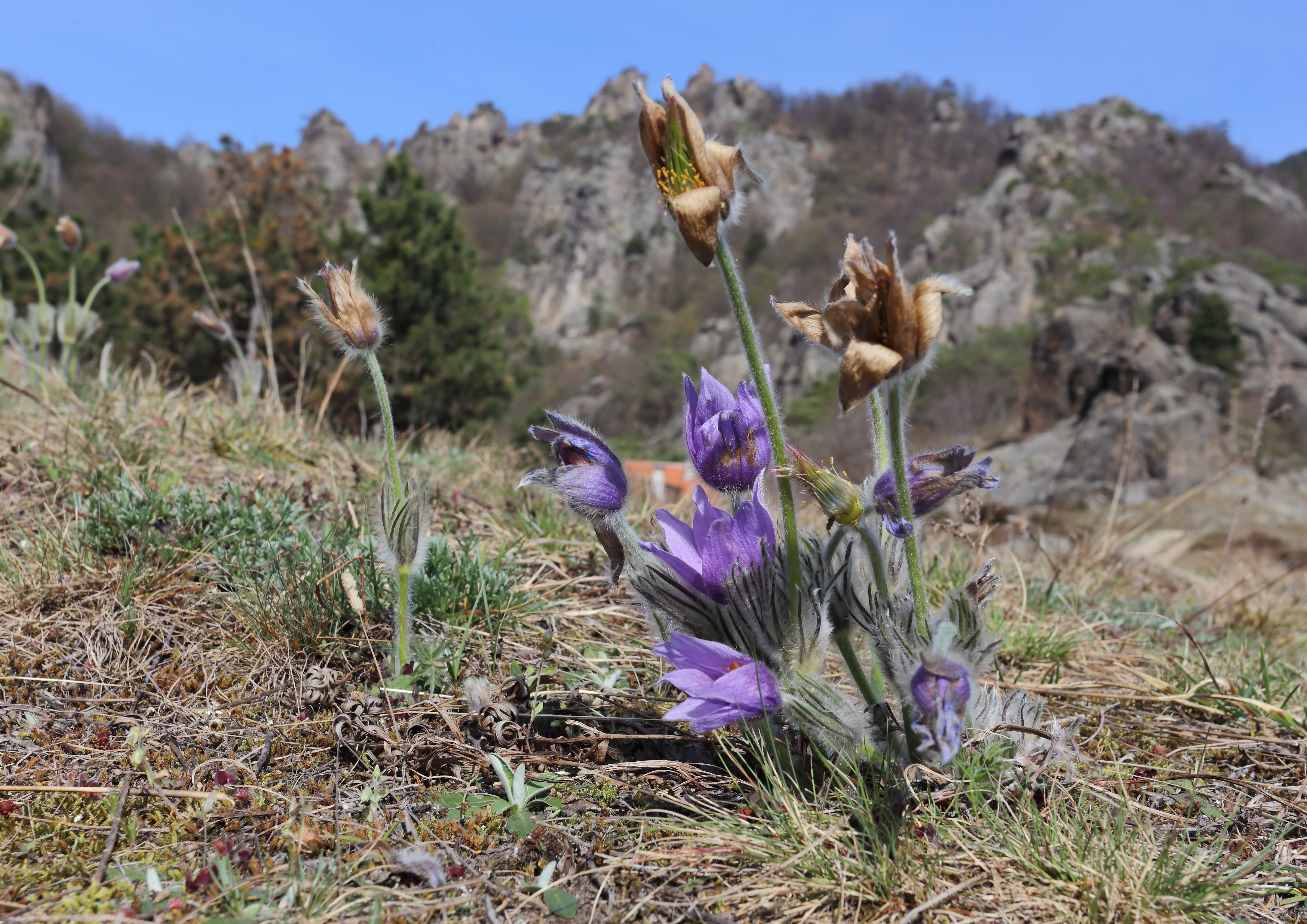 Große Kuhschellen auf einem unter Naturschutz stehender Trockenrasen bei Dürnstein. This media shows the natural monument in Lower Austria with the ID KR-109.